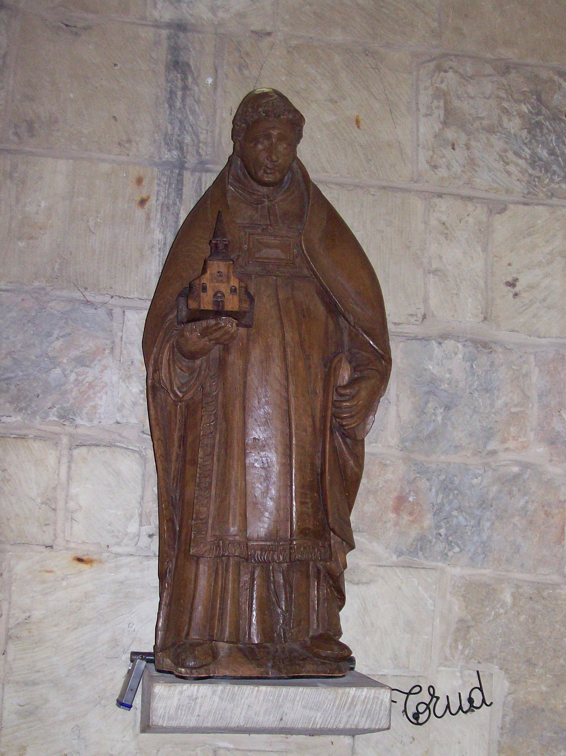 Statue de St Trudon, dans l'église St Gangulphe (St Trond, Belgique)